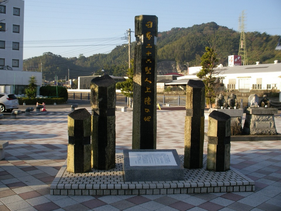 日本二十六聖人上陸の碑。西彼杵郡時津町時津港